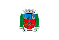 Bandeira da cidade paulista de Cubatão